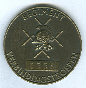 Coin van het Regiment Verbindingstroepen. Word uitgereikt door de regimentscommandant (met oorkonde op nummer) aan personeel dat bij het regiment beëdigd word of aan personen die bijzondere verdiensten tov het regiment hebben verleend.